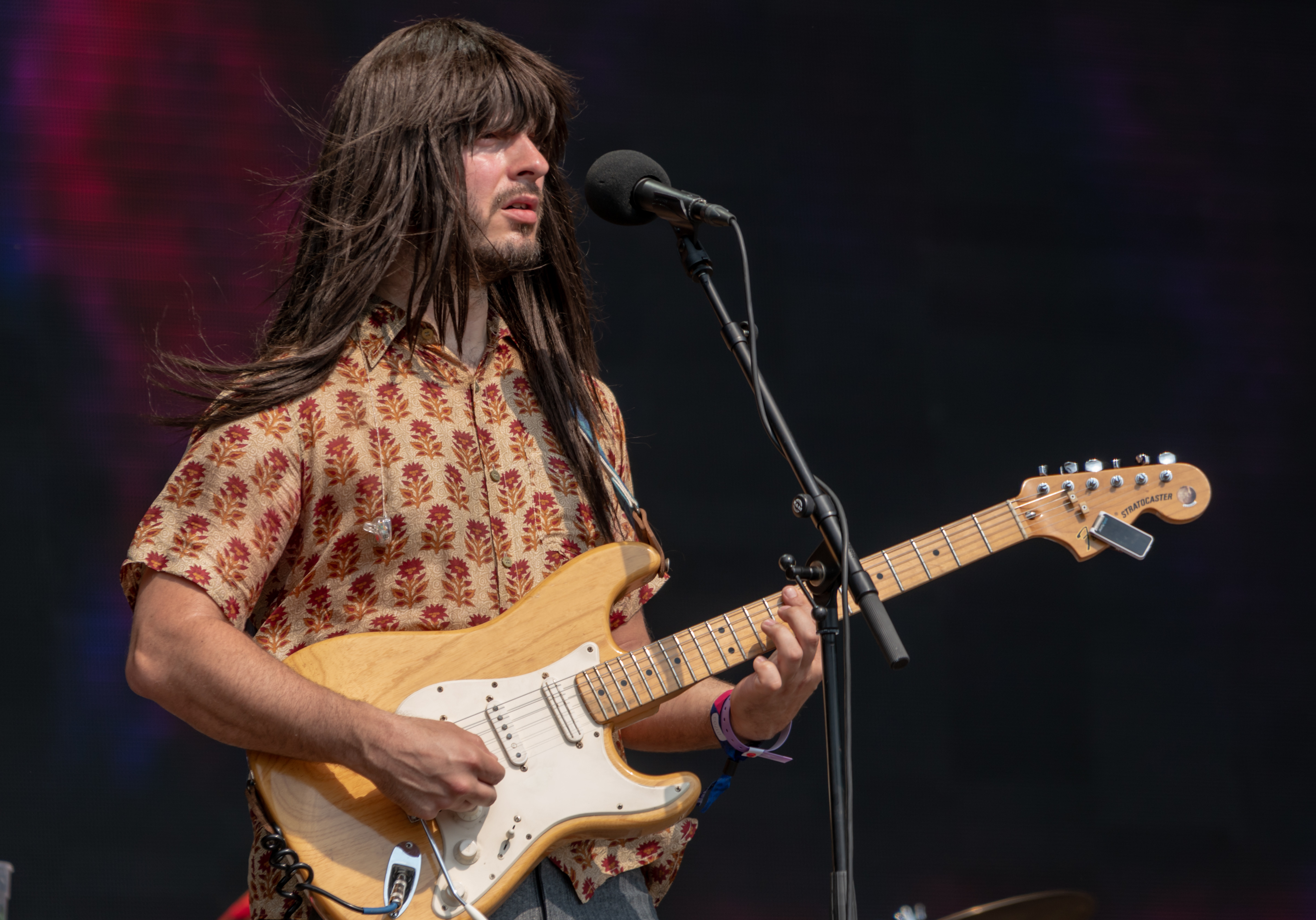 APEVicPark270518-26